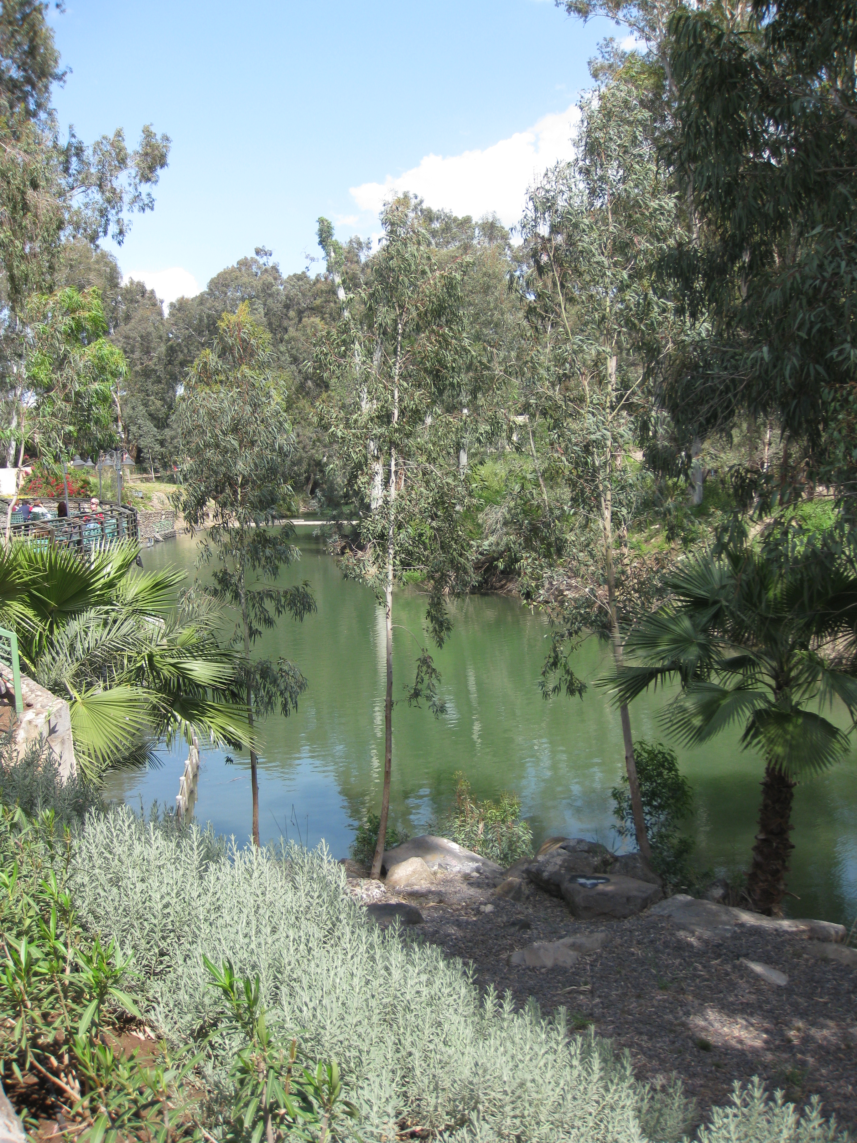 Yardnit ירדנית אתר הטבילה בירדן דרומית לסכר דגניה